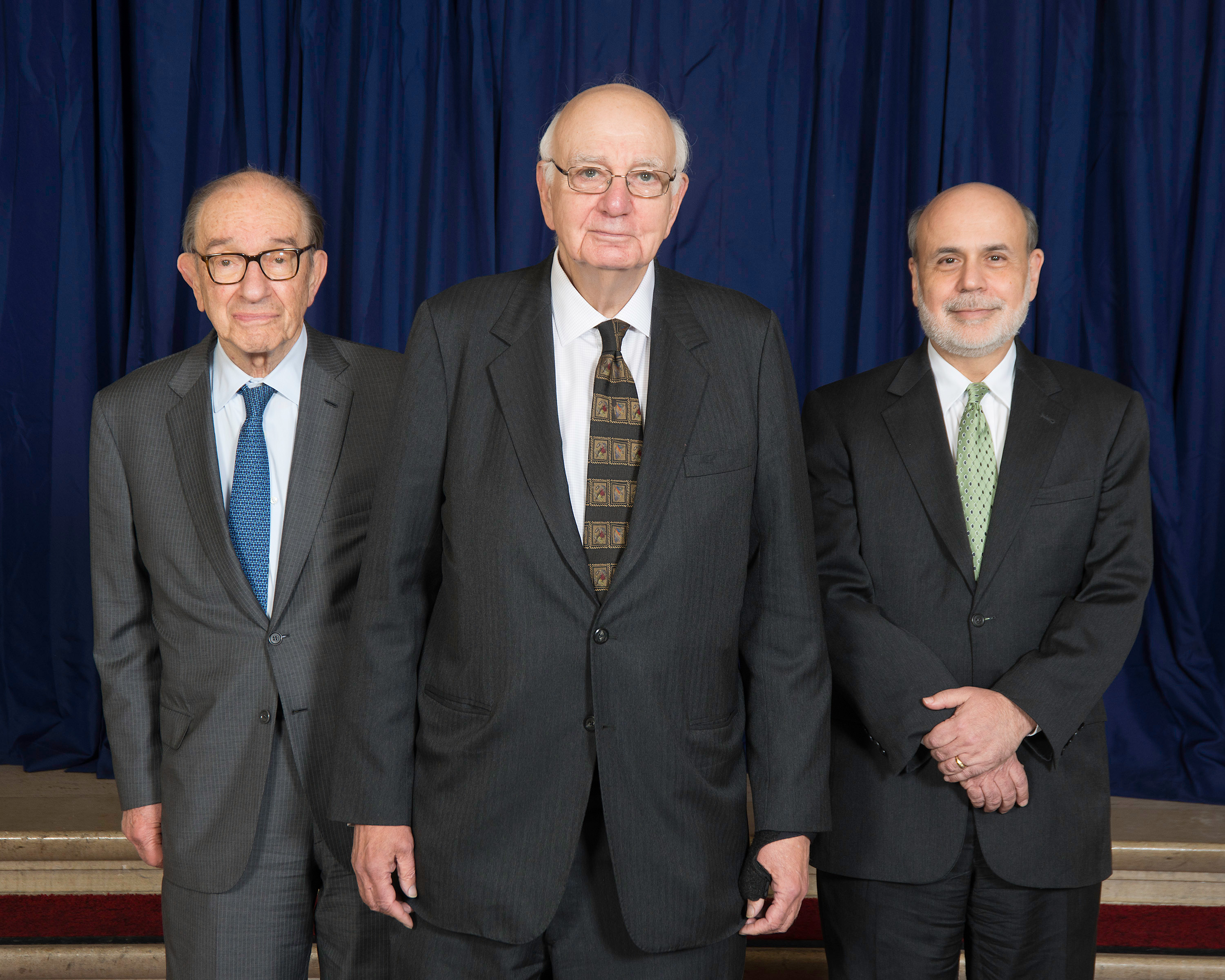 Board Chairmen (Left to Right: Alan Greenspan; Paul A. Volcker; Ben S. Bernanke)